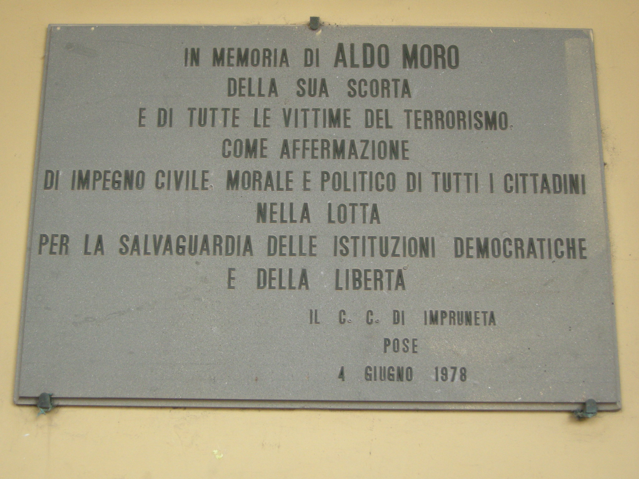 Palazzo del comune, impruneta, targa aldo moro